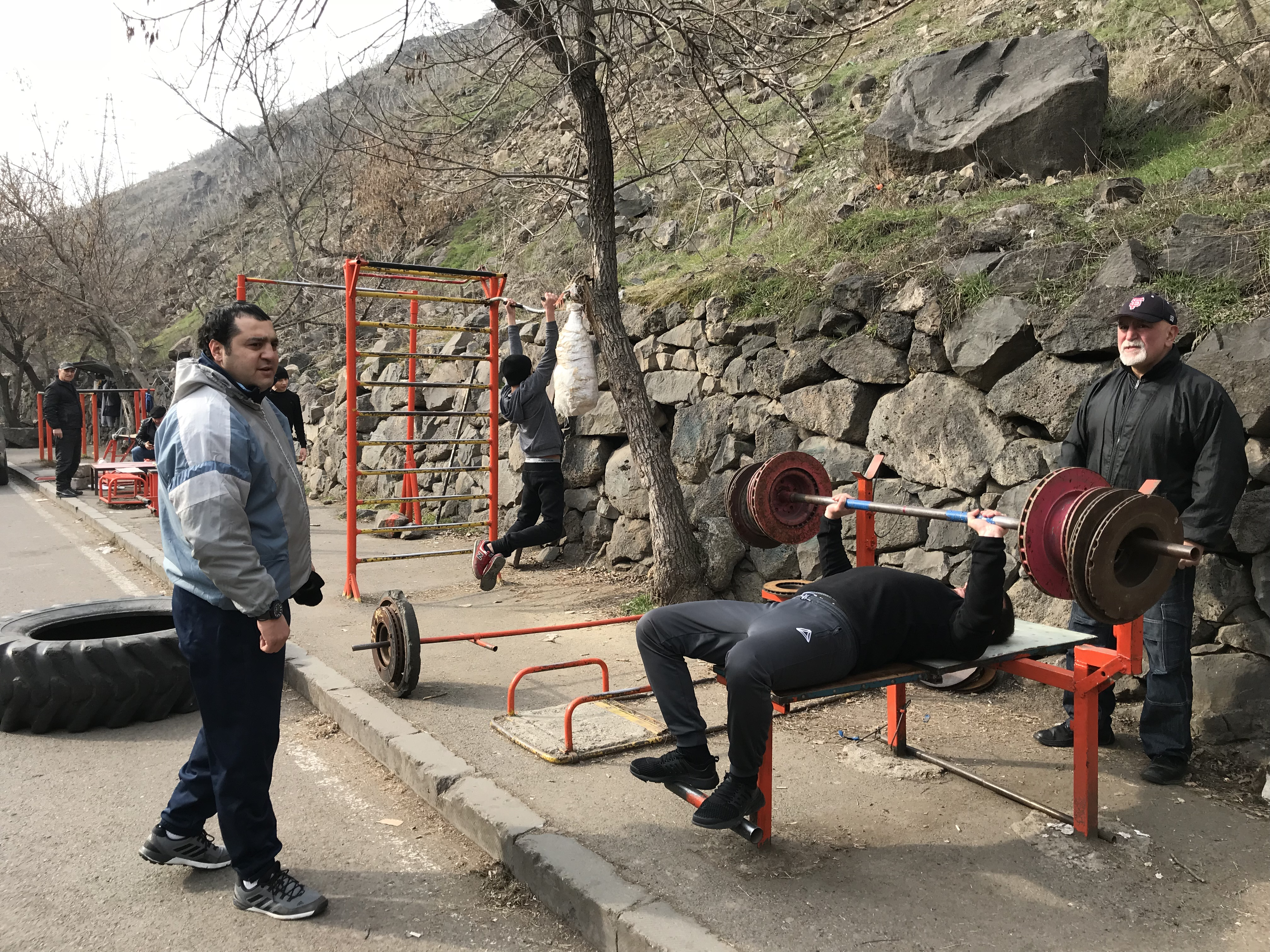 Հրազդանի ձորի բացօդյա մարզասրահում մարզիկների պարապմունքը (ձախից բռնցքամարտի աշխարհի չեմպիոն Արտակ Մալումյանն է)